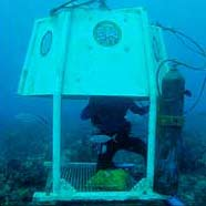 Labor Aquarius